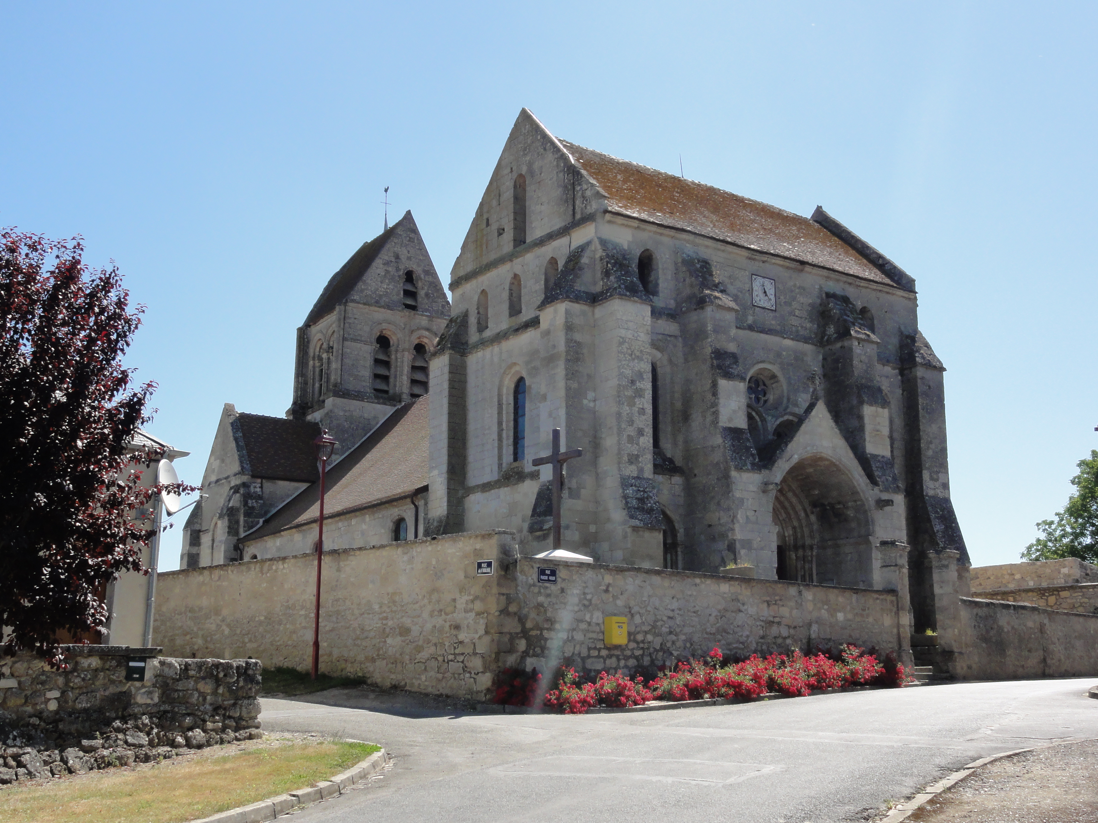 Glennes (Aisne) église